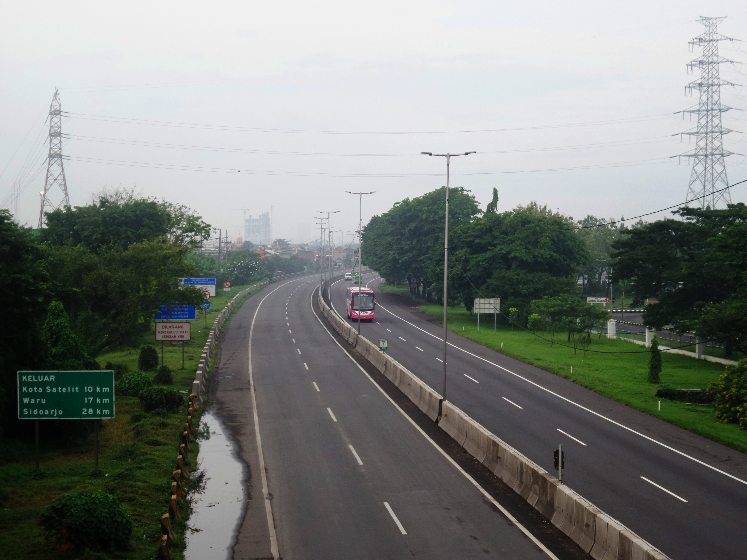 Jalan Tol Surabaya-Porong B